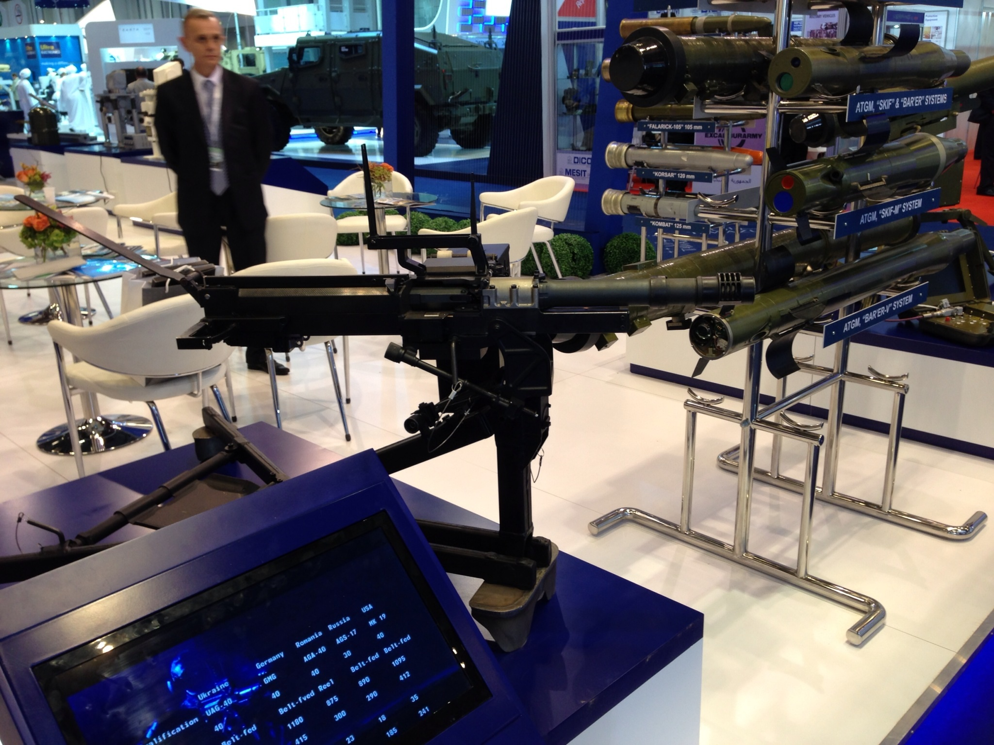 UAG-40